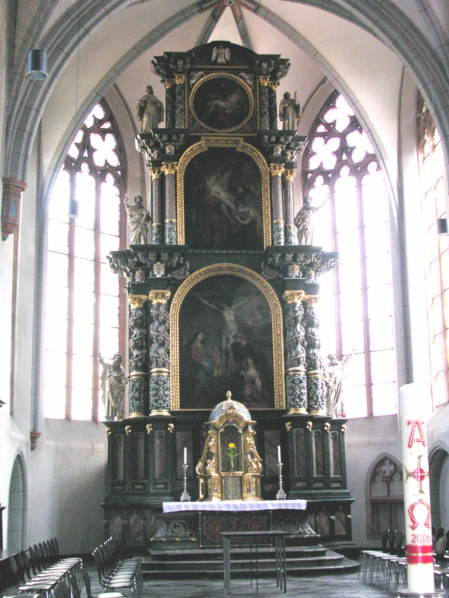 Aachen, in der Neujahrsnacht 2011 zerstörter Hochaltar der Nikolauskirche 2005. Vier Holzfiguren die Bilder des Rubens-Schülers Robert von Depenbeeck wurden durch eine Silvesterrakete, die durch ein Fenster flog und im Gebäude explodierte, zerstört. Eine komplette Restaurierung ist unmöglich.